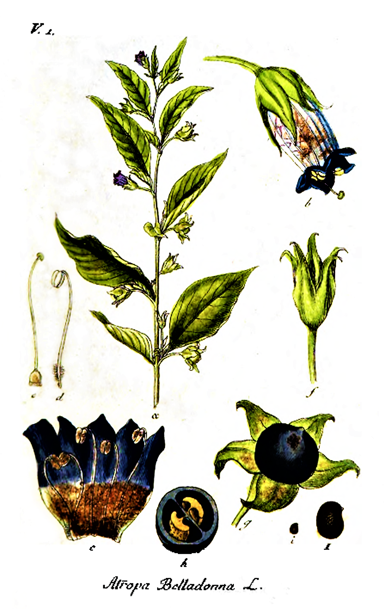 Jacob Sturm - Atropa belladonna